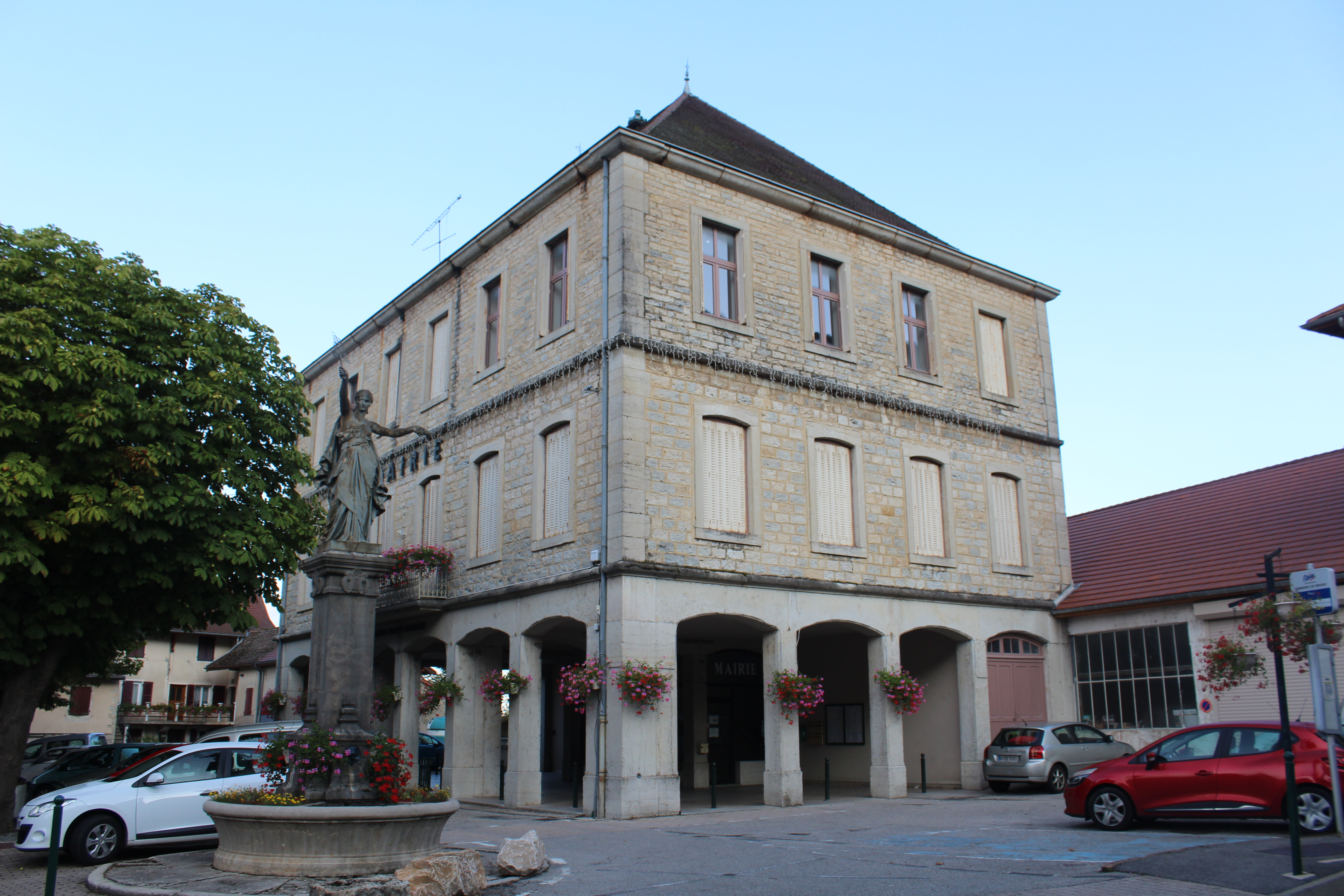 Mairie de Serrières-de-Briord.